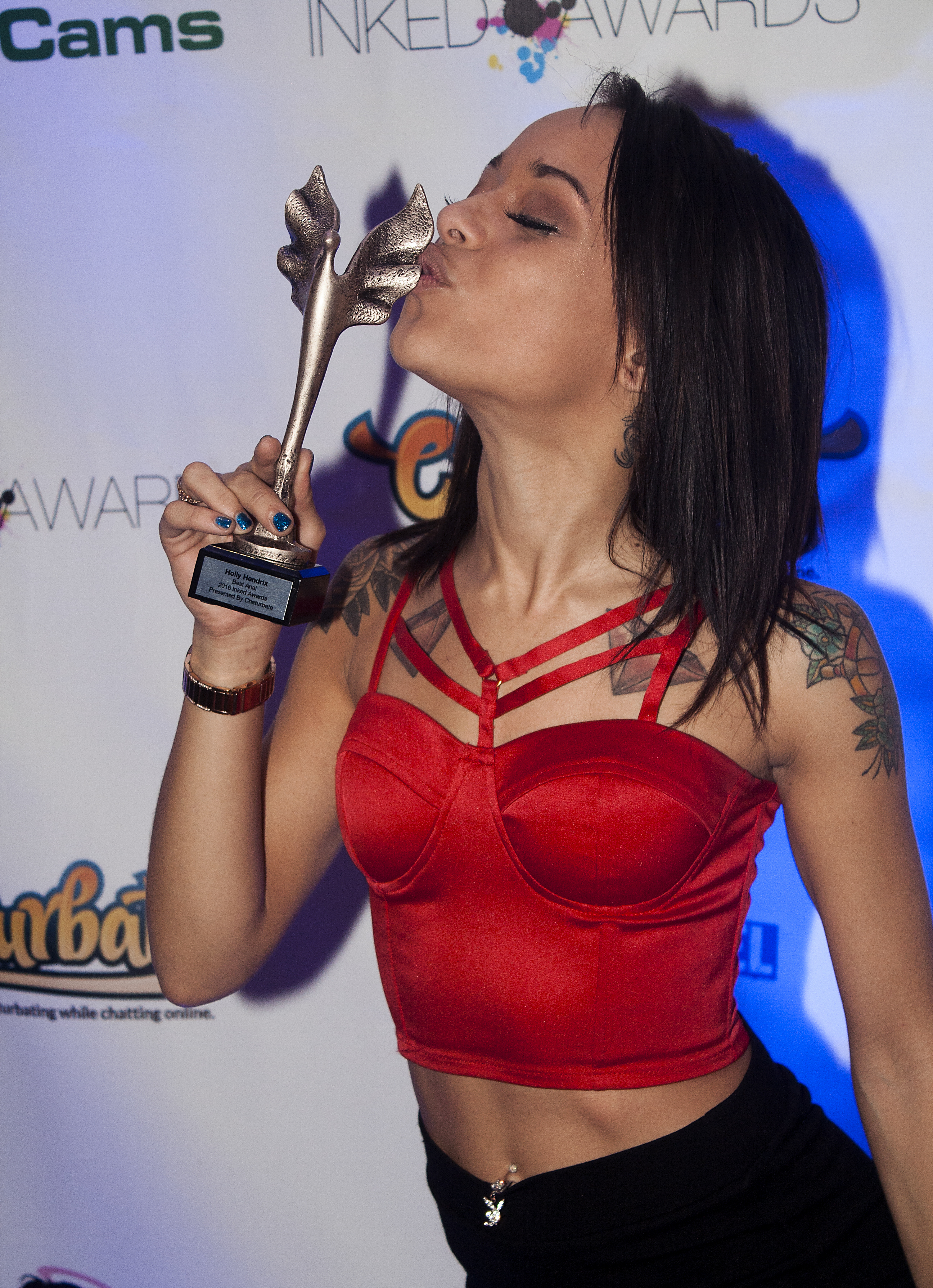 Exxxotica2016_0174bas